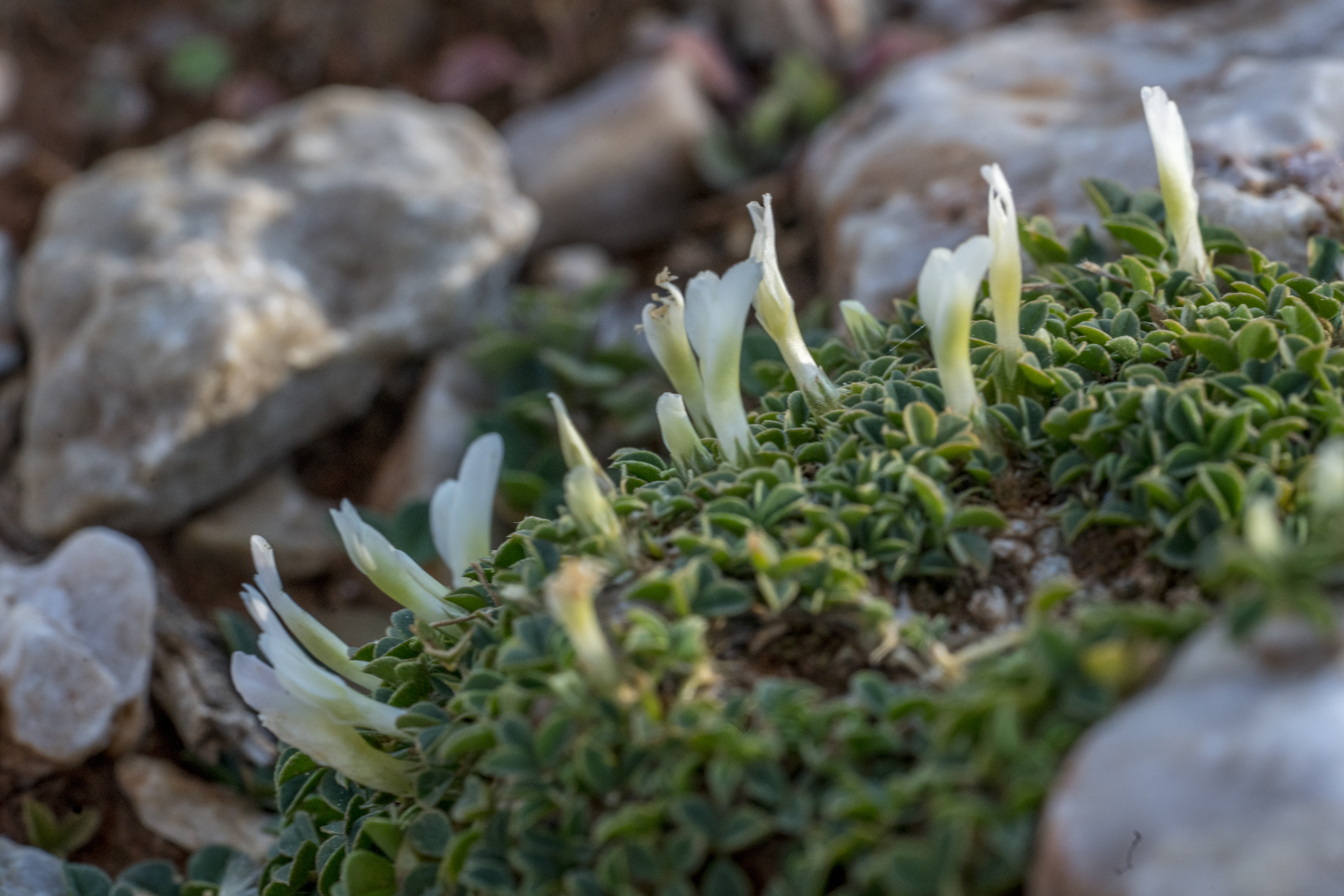 Trifolium uniflorum, Kreta